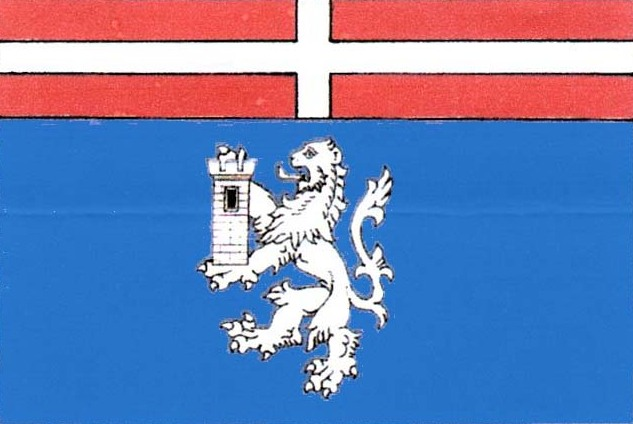 Vlajka obce Křižínkov